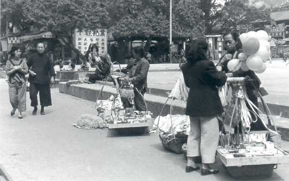 中文（香港）: 1950年的廟街。